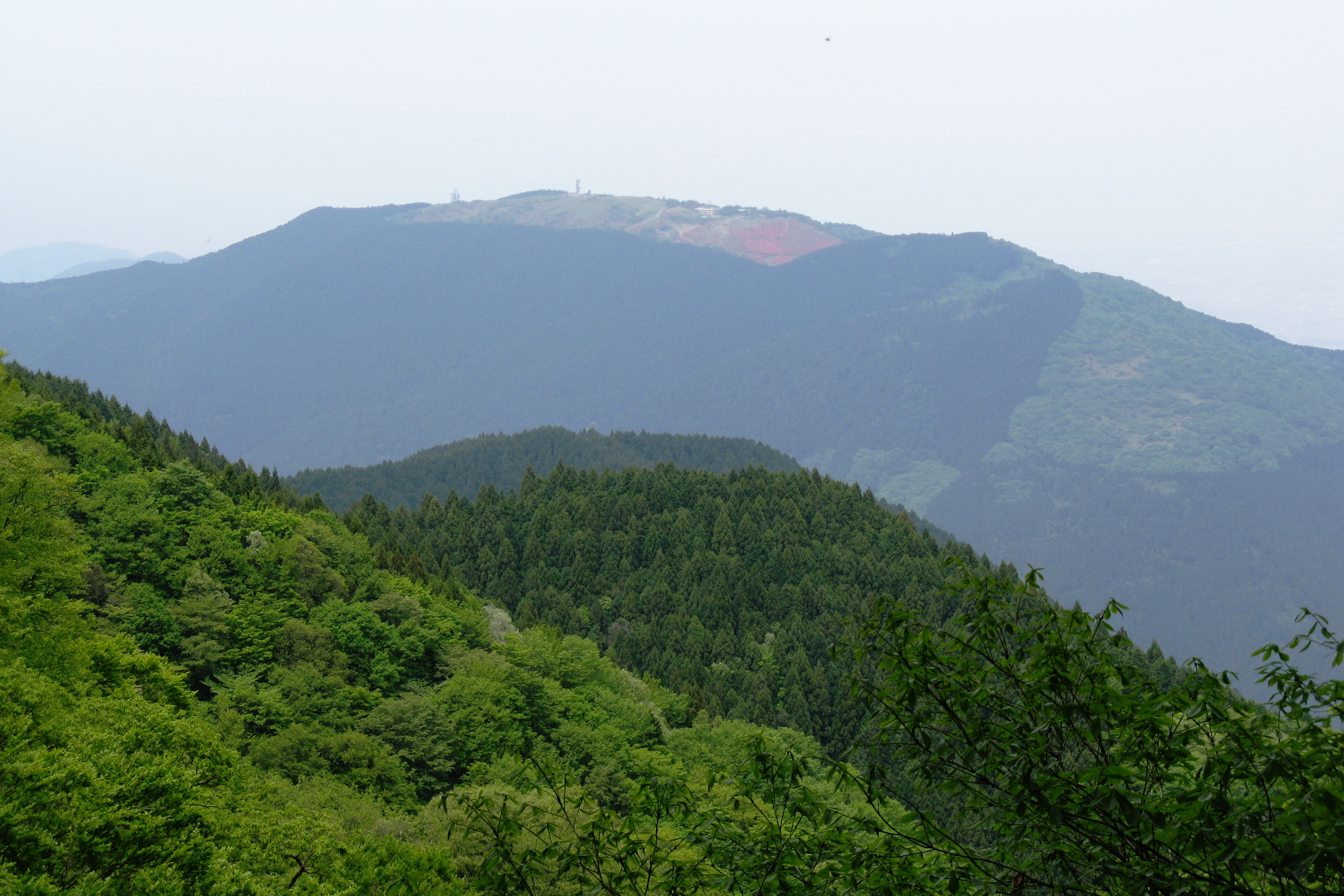 大和葛城山（金剛山・葛木神社の裏参道より撮影）